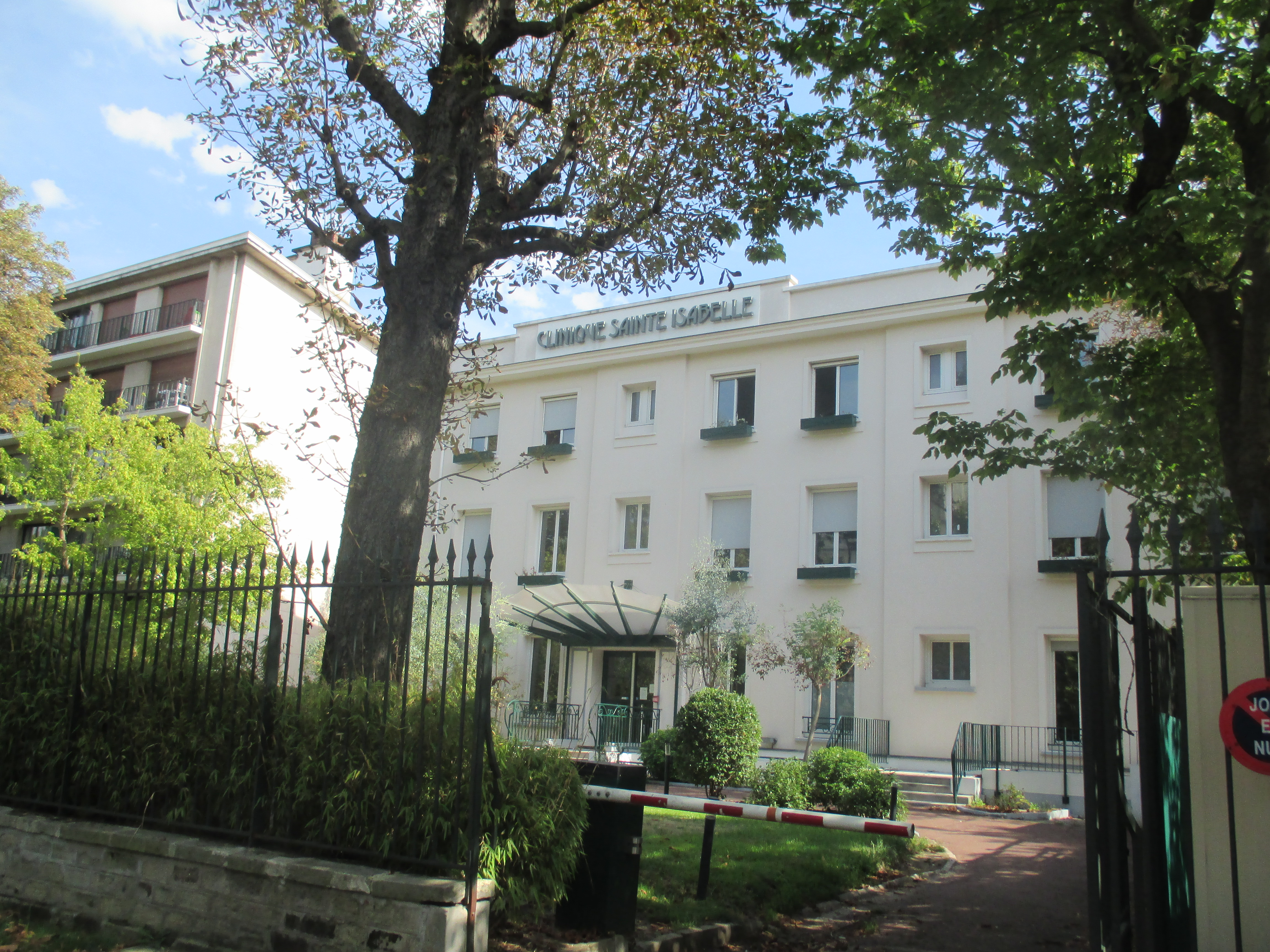 Façade de la clinique Sainte-Isabelle boulevard du Château à Neuilly.